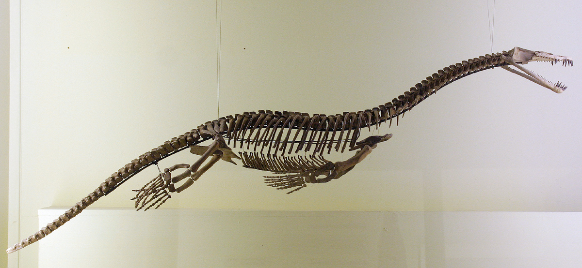 Nothosaurier-Skelett (Gattung Nothosaurus) im Berliner Museum für Naturkunde, Mineralienabteilung